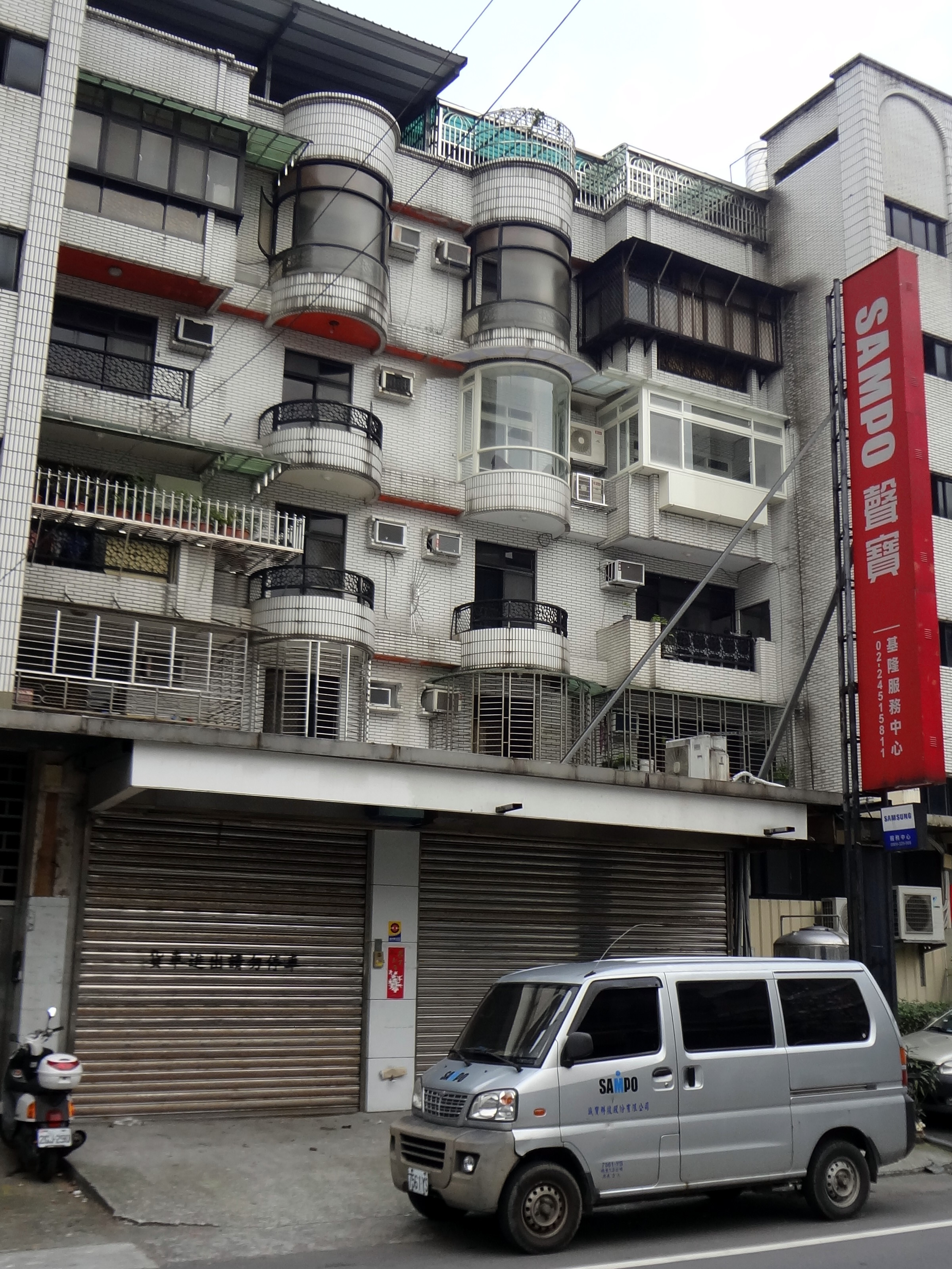 誠寶科技股份有限公司（聲寶股份有限公司的子公司）設立的聲寶基隆服務中心，位於臺灣基隆市七堵區福一街143號1樓，開業於2010年2月。